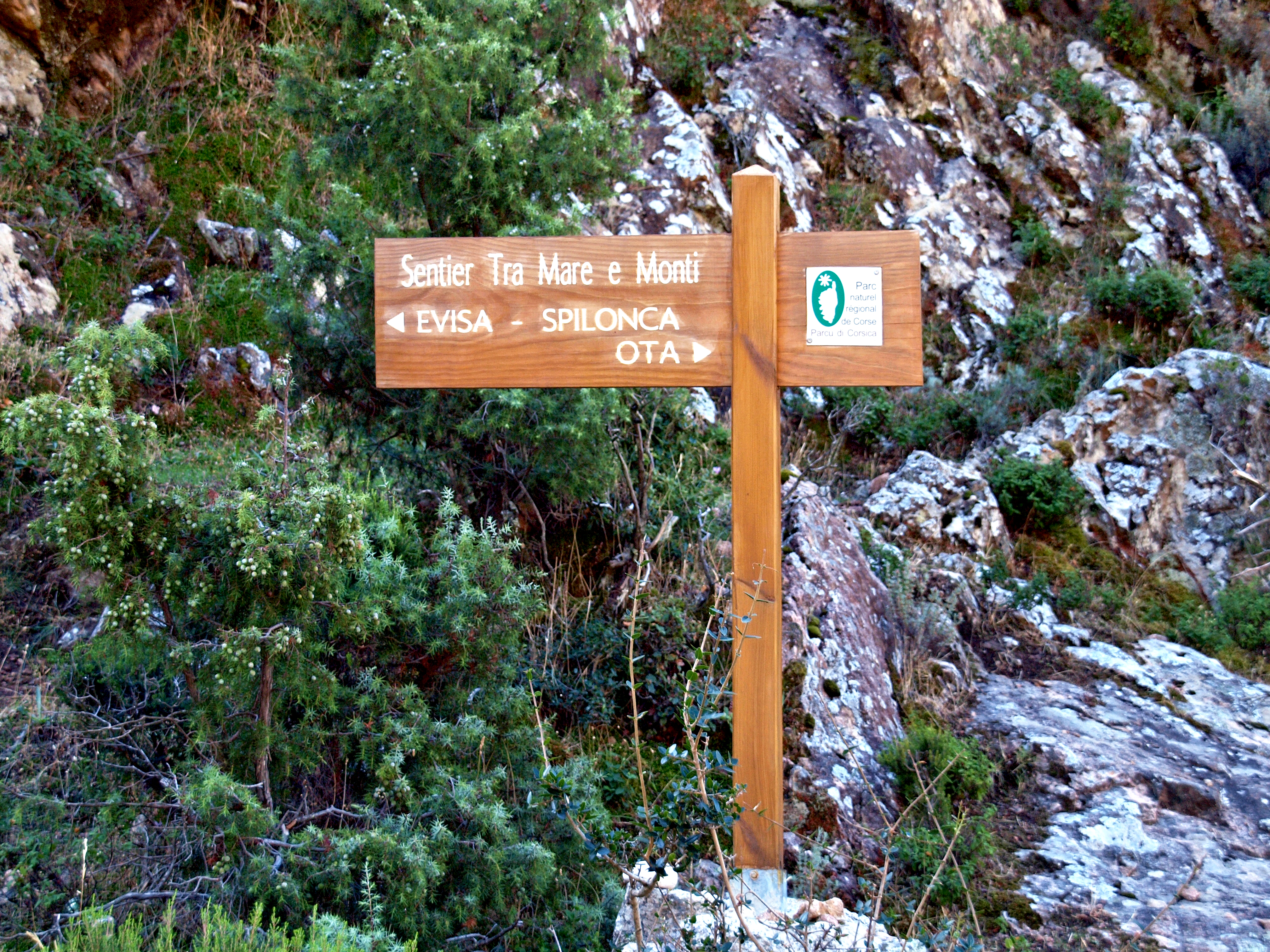 Ota (Corsica) - Panneau "Sentier Tra Mare e Monti" sur la D124 à l'entrée du pont sur la Spilonca